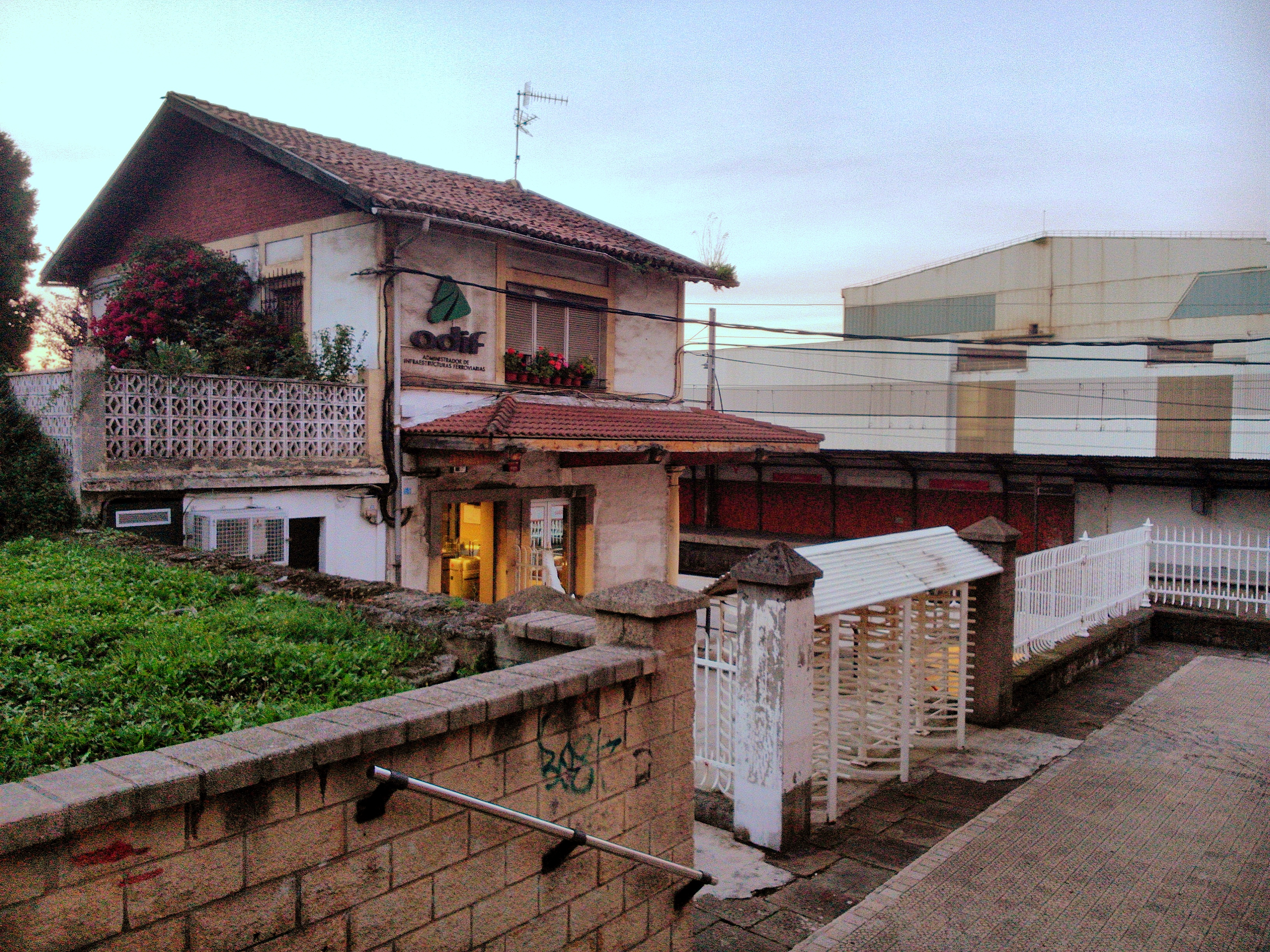 La Iberia tren geltokia Sestao Renfe Aldiriak Adif